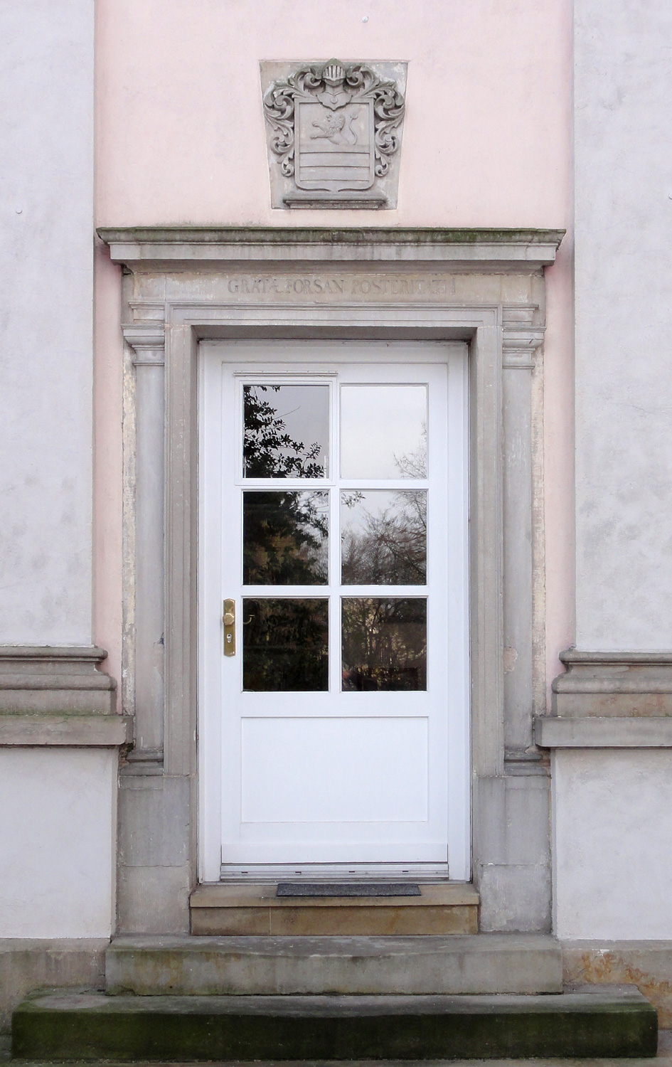 Egestorff-Stiftung in Bremen: Gutshaus (um 1755), Westeingang Das abgebildete Objekt ist ein geschütztes Kulturdenkmal in der Freien Hansestadt Bremen, mit der Nr. 1724 beim Landesamt für Denkmalpflege registriert.